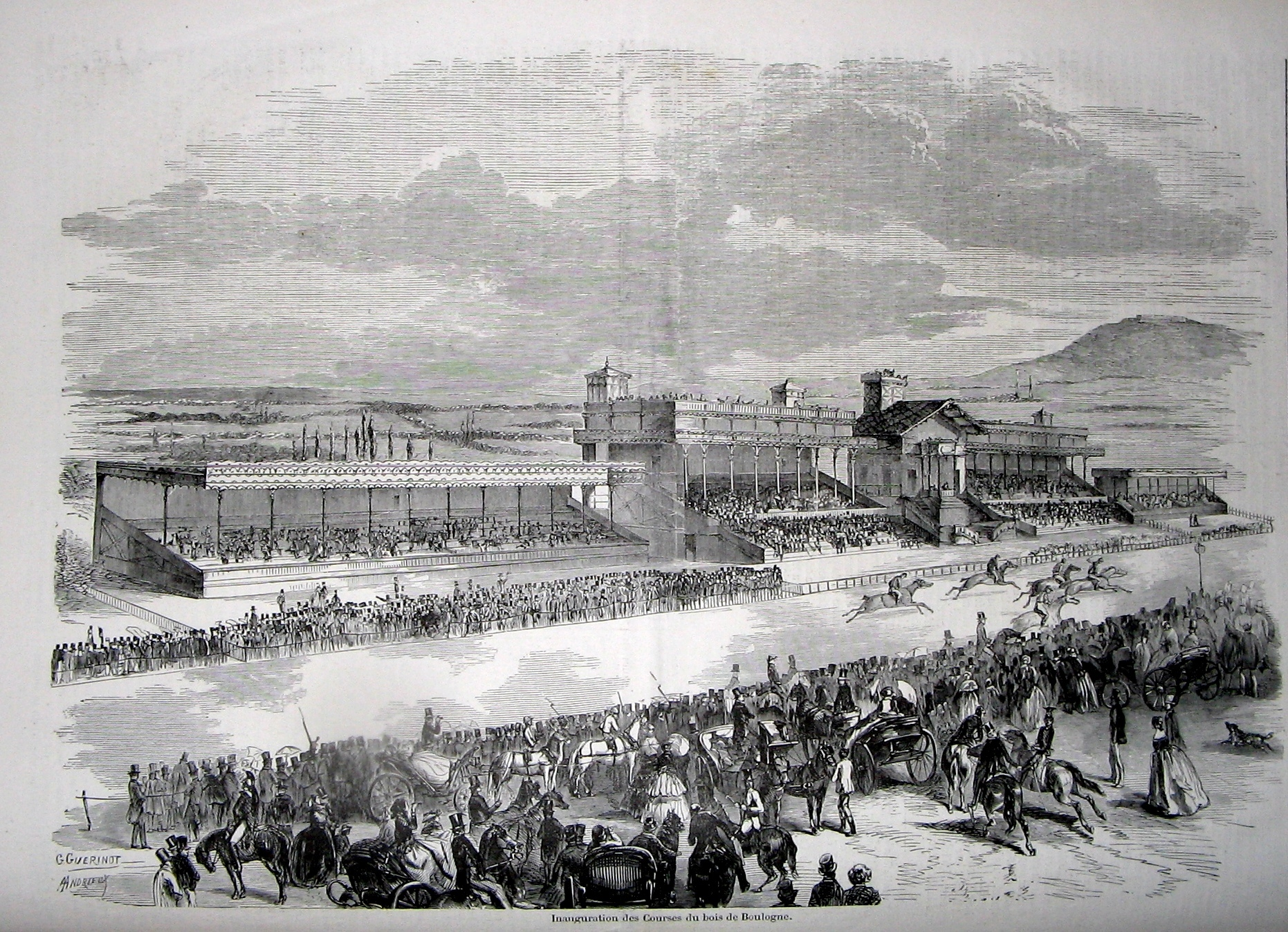 Inauguration des Courses du bois de Boulogne.